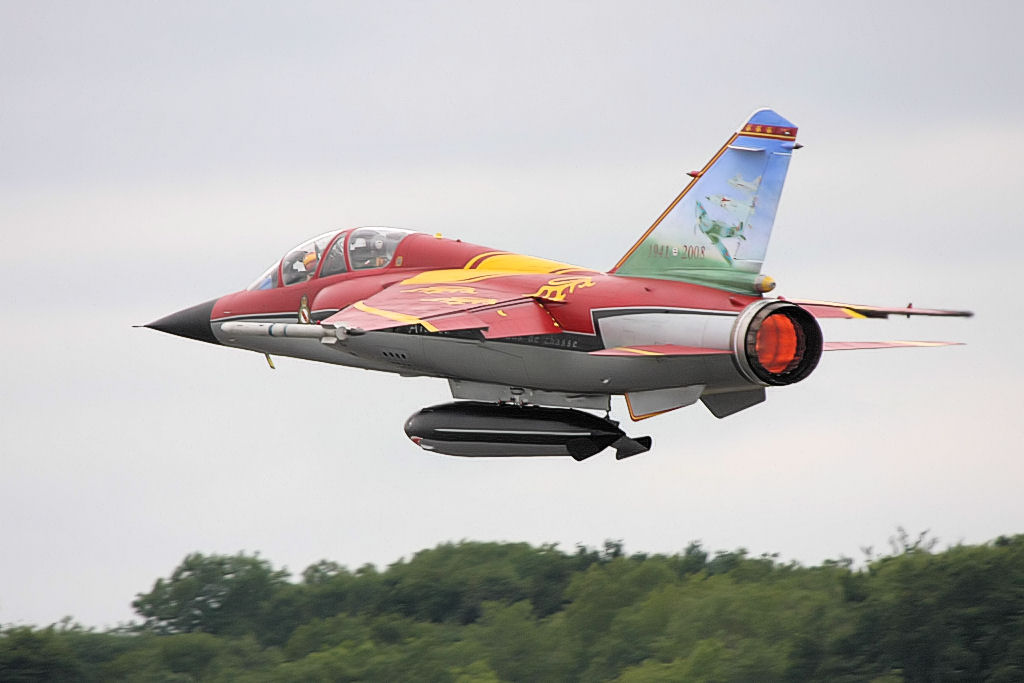 Mirage F1 - RIAT 2008